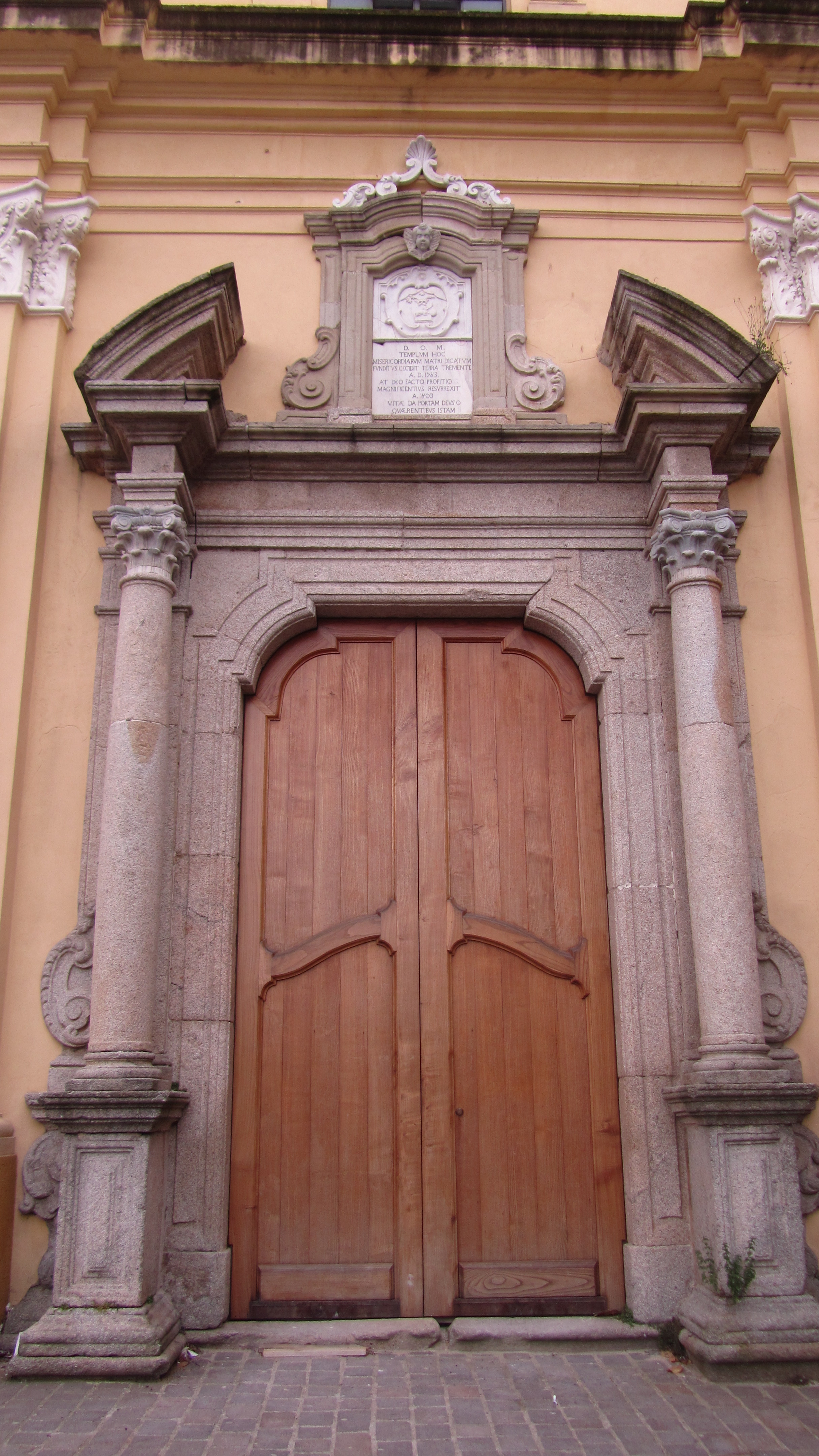 Portone della Chiesa del Rosario